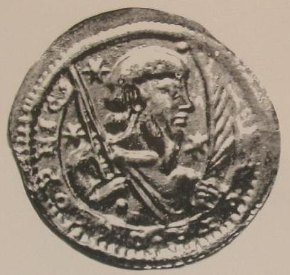 Brakteat Jaxa von Köpenick; Heimatmuseum Berlin-Köpenick